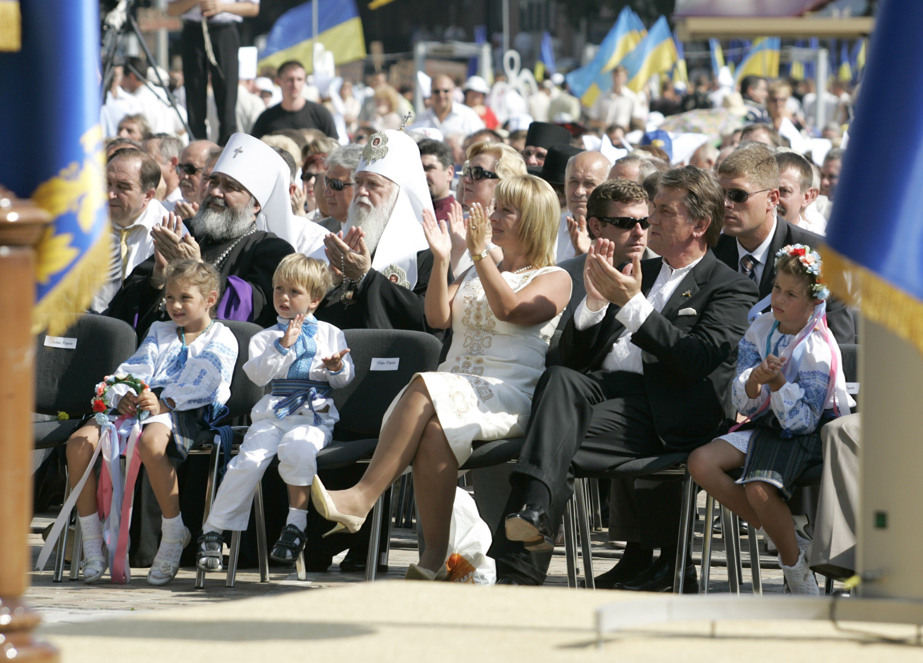 Президент України Віктор Ющенко з дружиною Катериною і дітьми аплодують під час проведення урочистих заходів з нагоди 16-16-ї річниці Незалежності України на Софійській площі в Києві, у п'ятницю, 24 серпня 2007 р. У другому ряду сидять глава Української автокефальної православної церкви Митрополіт Мефодій (зліва) і Патріарх Київський і всієї Русі-України Філарет. Фото Михайла Марківа / POOL / УНІАН